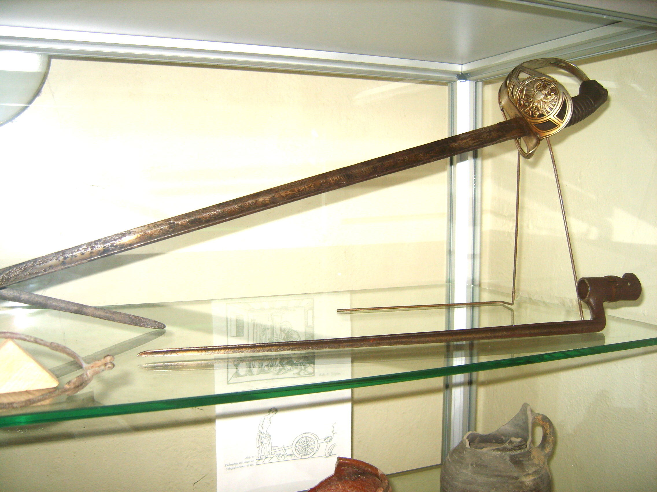 Degen der Demminer Ulanen